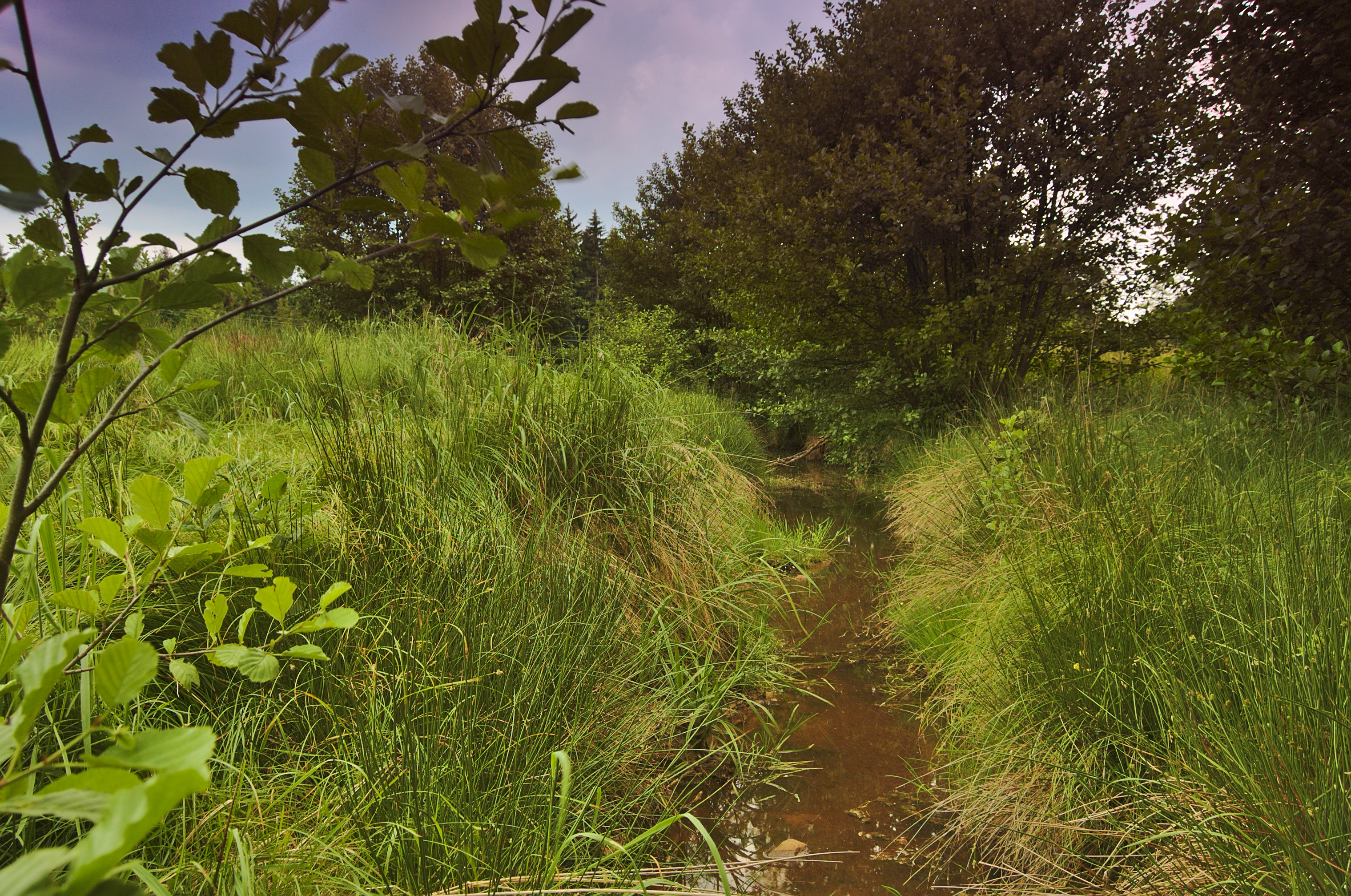 Potok Žďárná před Horním rybníkem, Velenov, okres Blansko